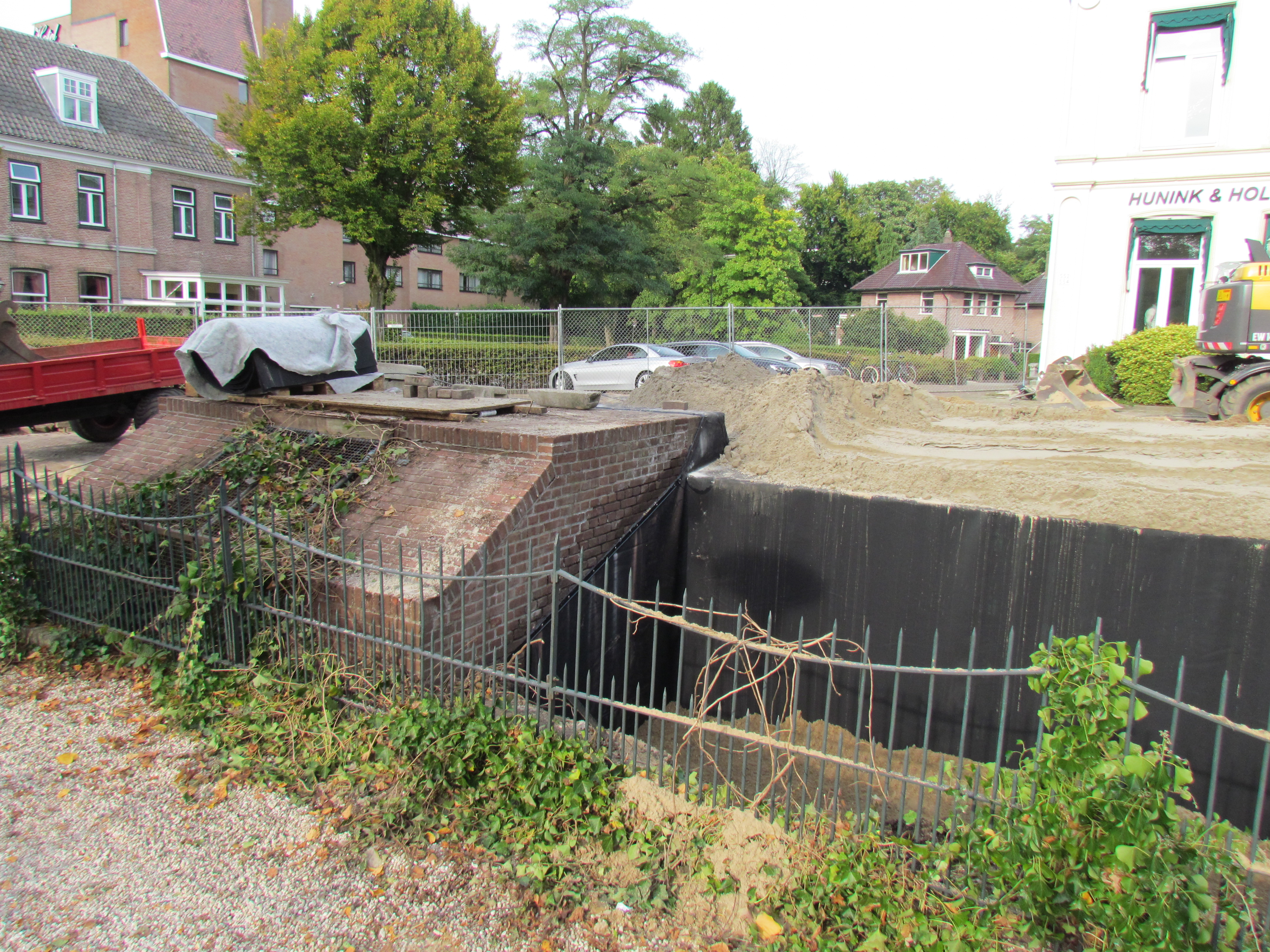 Arthur Seyss-Inquarts schuilkelder in Apeldoorn tijdens de renovatie in 2017